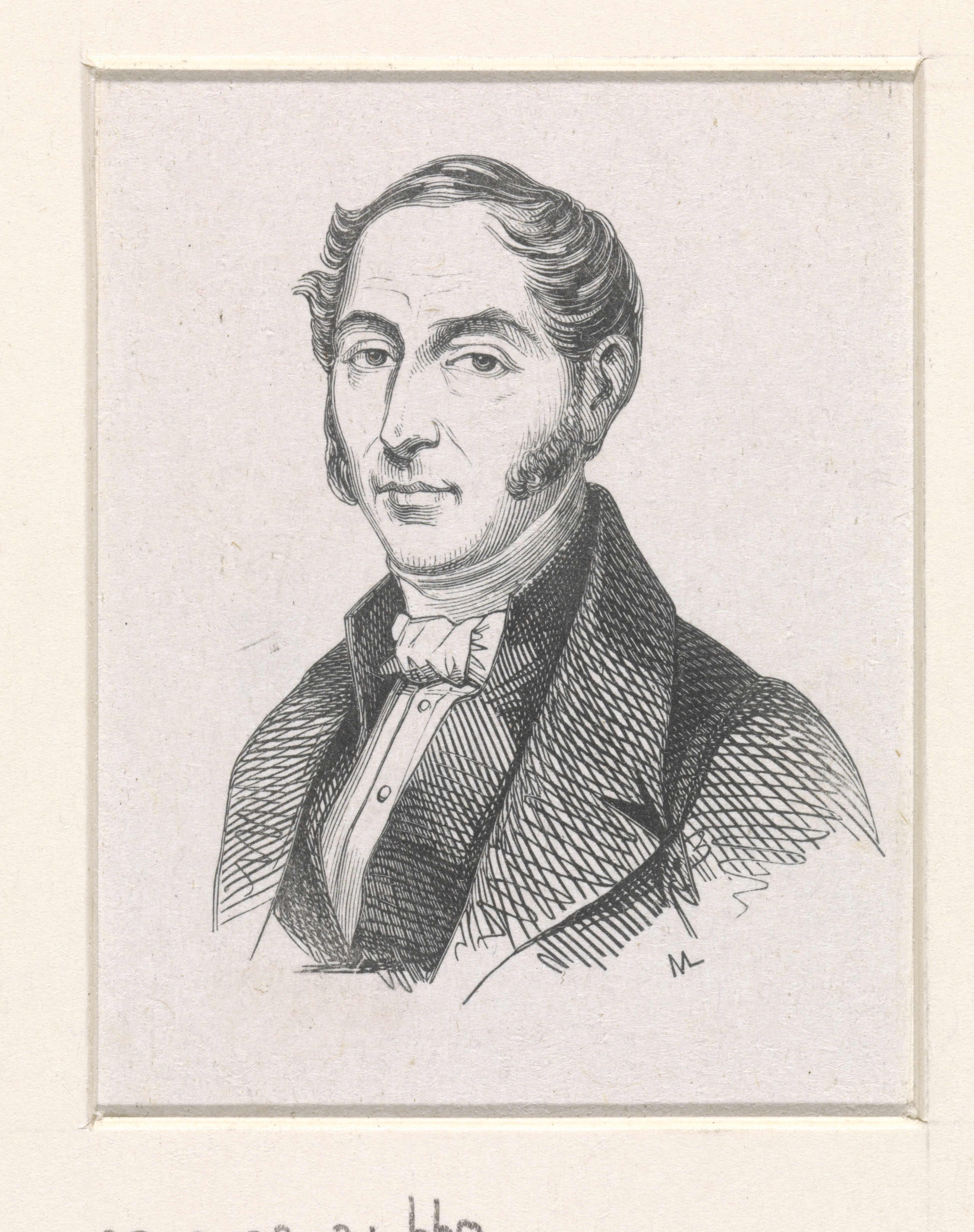 IdentificatieTitel(s): Portret van Arnoldus BloemersObjecttype: prent Objectnummer: RP-P-OB-31.660VervaardigingVervaardiger: prentmaker: Monogrammist M (Duitsland)naar tekening van: Johan Coenraad HamburgerDatering: 1841 - 1842Fysieke kenmerken: houtgravureMateriaal: papier Techniek: houtgravureAfmetingen: h 57 mm (voorstelling gemeten) × b 45 mmOnderwerpWat: historical person (ARNOLDUS BLOEMERS) - historical person (ARNOLDUS BLOEMERS) portrayed aloneportrait, self-portrait of draughtsmanportrait, self-portrait of painterportrait, self-portrait of artistWie: Arnoldus BloemersVerwerving en rechtenCredit line: Aankoop uit het F.G. Waller-FondsVerwerving: schenking 1940Copyright: Publiek domein